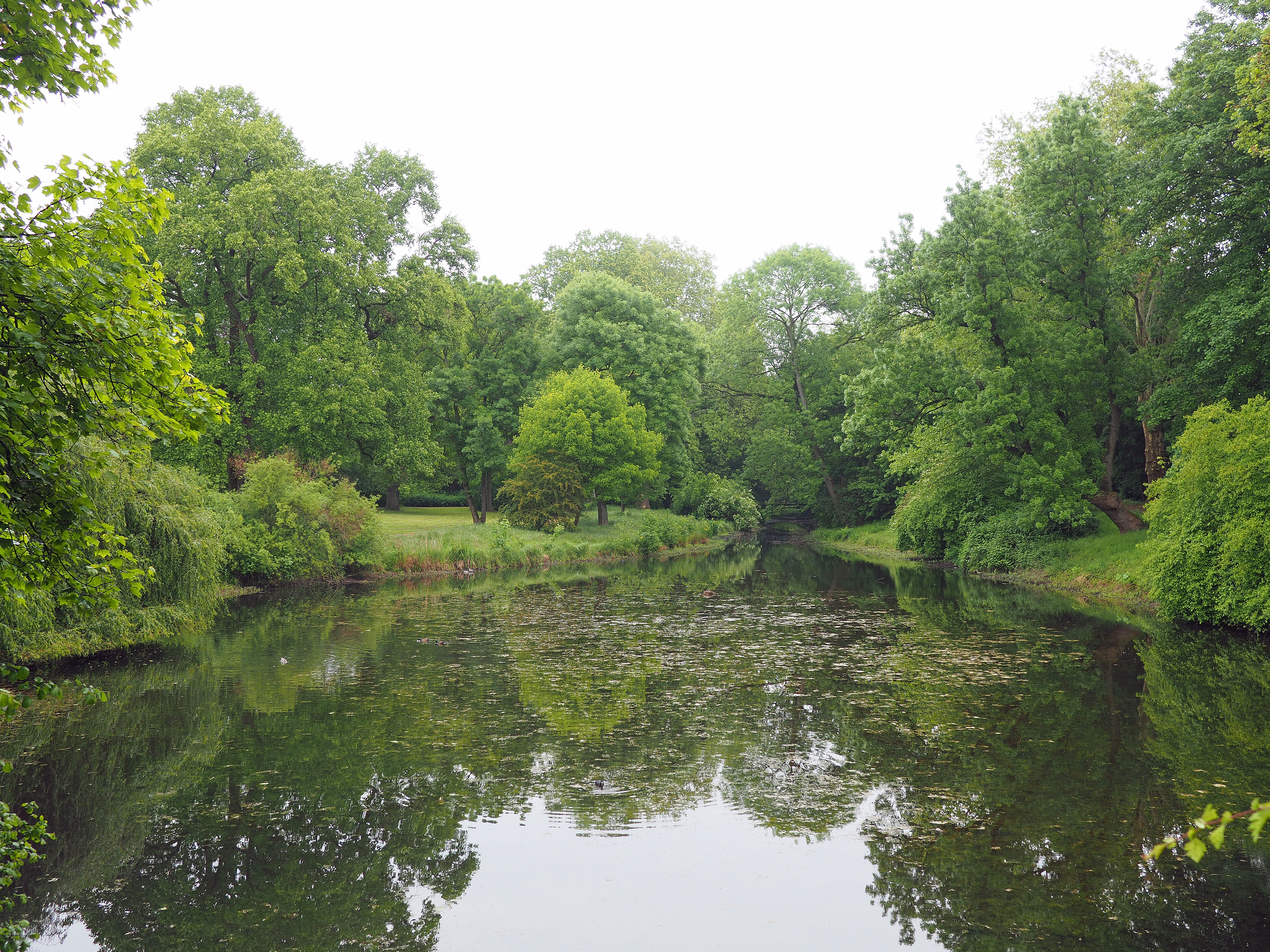 Krefeld Denkmal 819: Parkanlage Greiffenhorstpark